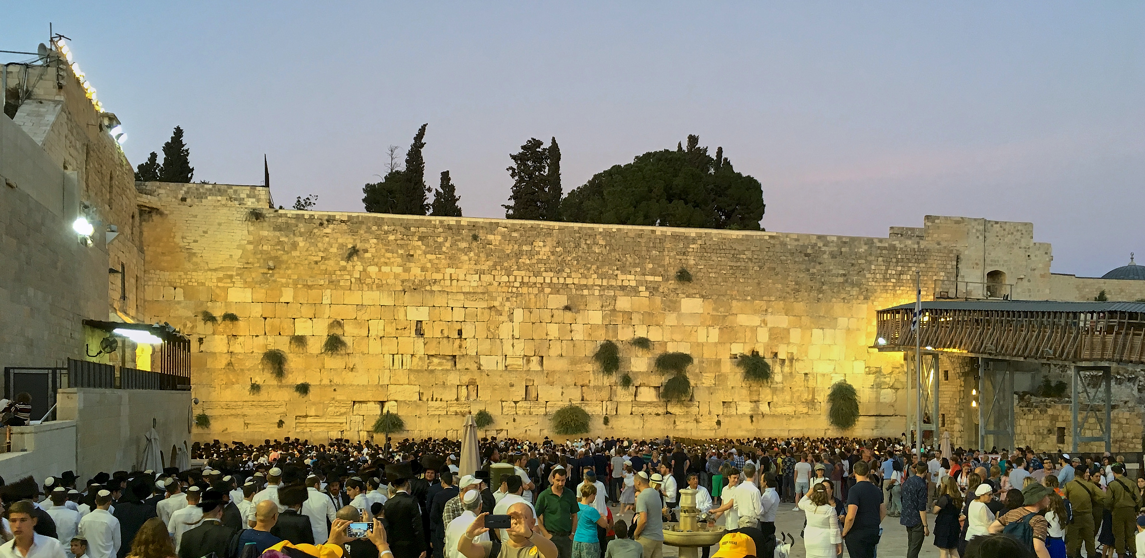 Евреи встречают вечер пятницы у Стены Плача